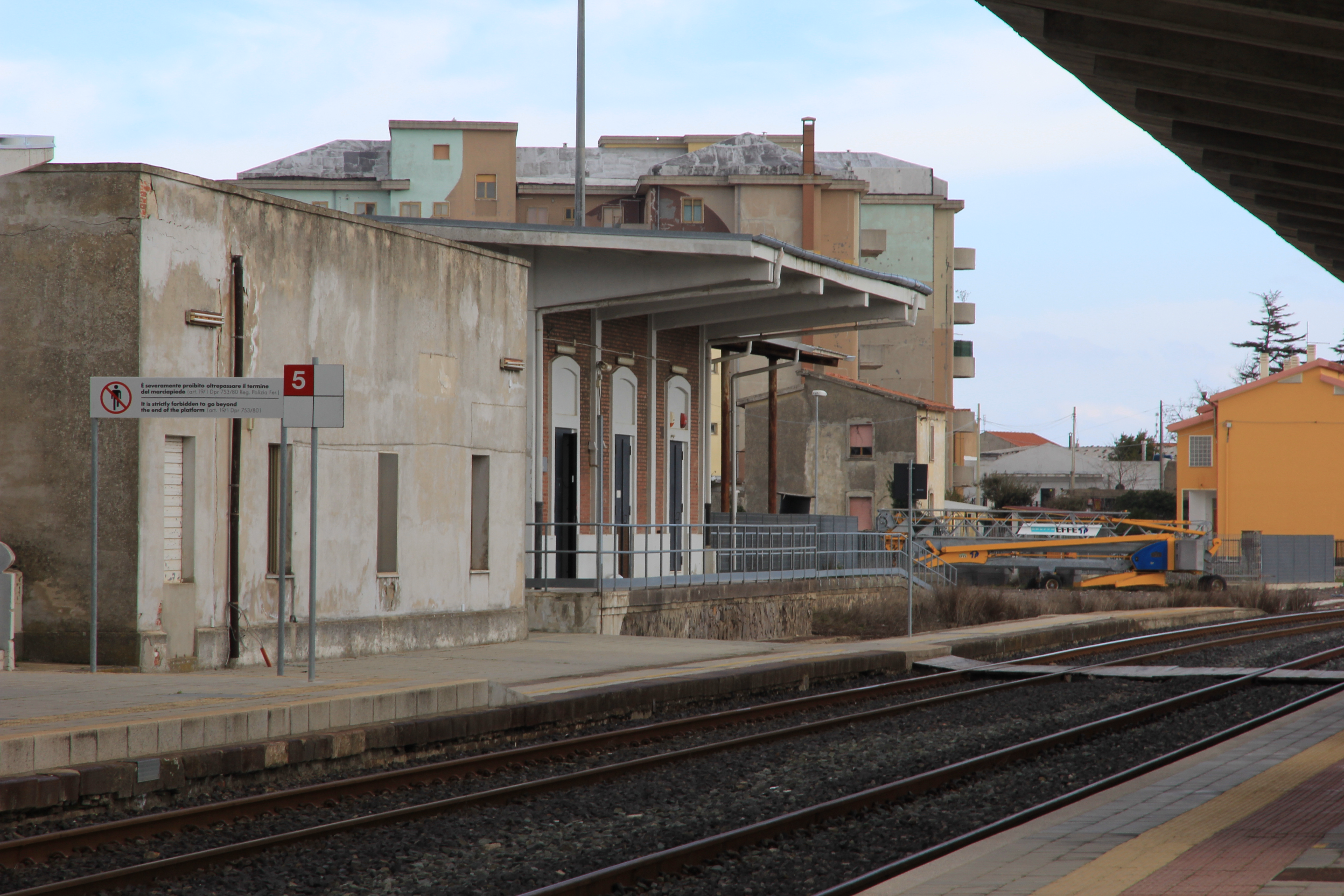 Stazione ferroviaria FS di Macomer